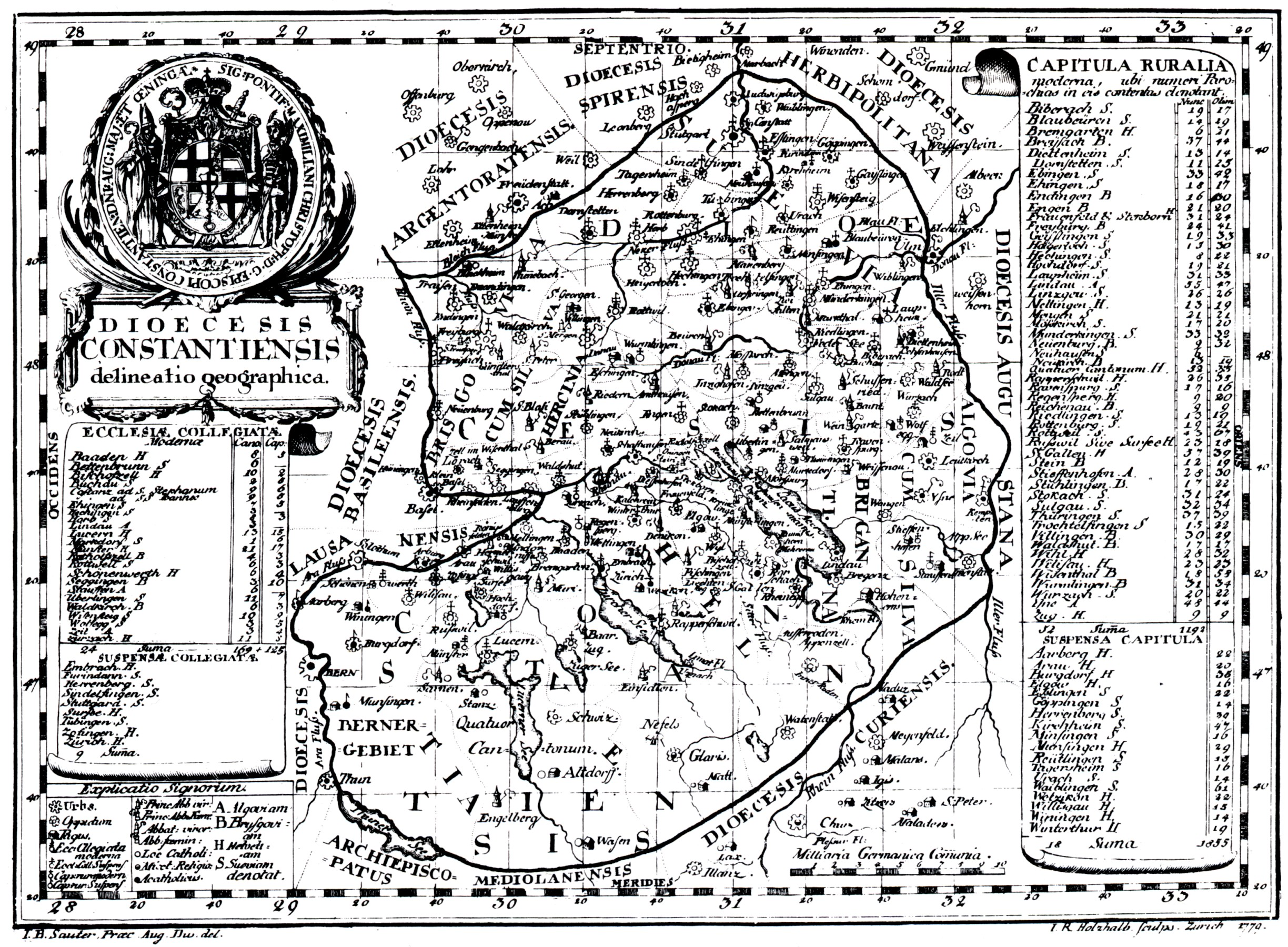 Karte des Bistums Konstanz mit der Dekanatseinteilung. Kupferstich von I. R. Holzhalb nach I. B. Sauter, in: Catalogus Personarum ecclesiasticarum et Locorum Dioceseis Constantientis, 1779; mit Wappen Maximilian Christoph von Rodt